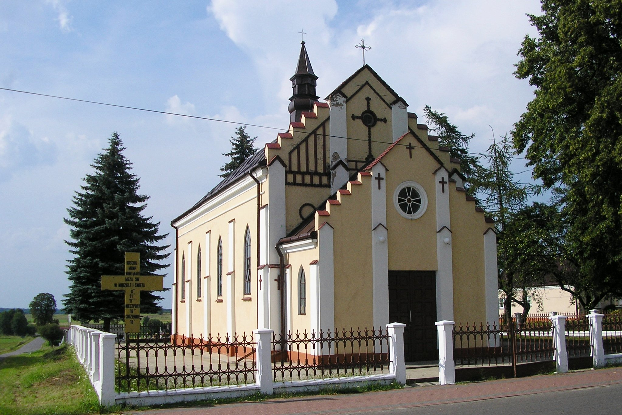 Nowy Nart, Kościół z 1905 r. pw Matki Bożej Nieustającej Pomocy, 2012-08-03